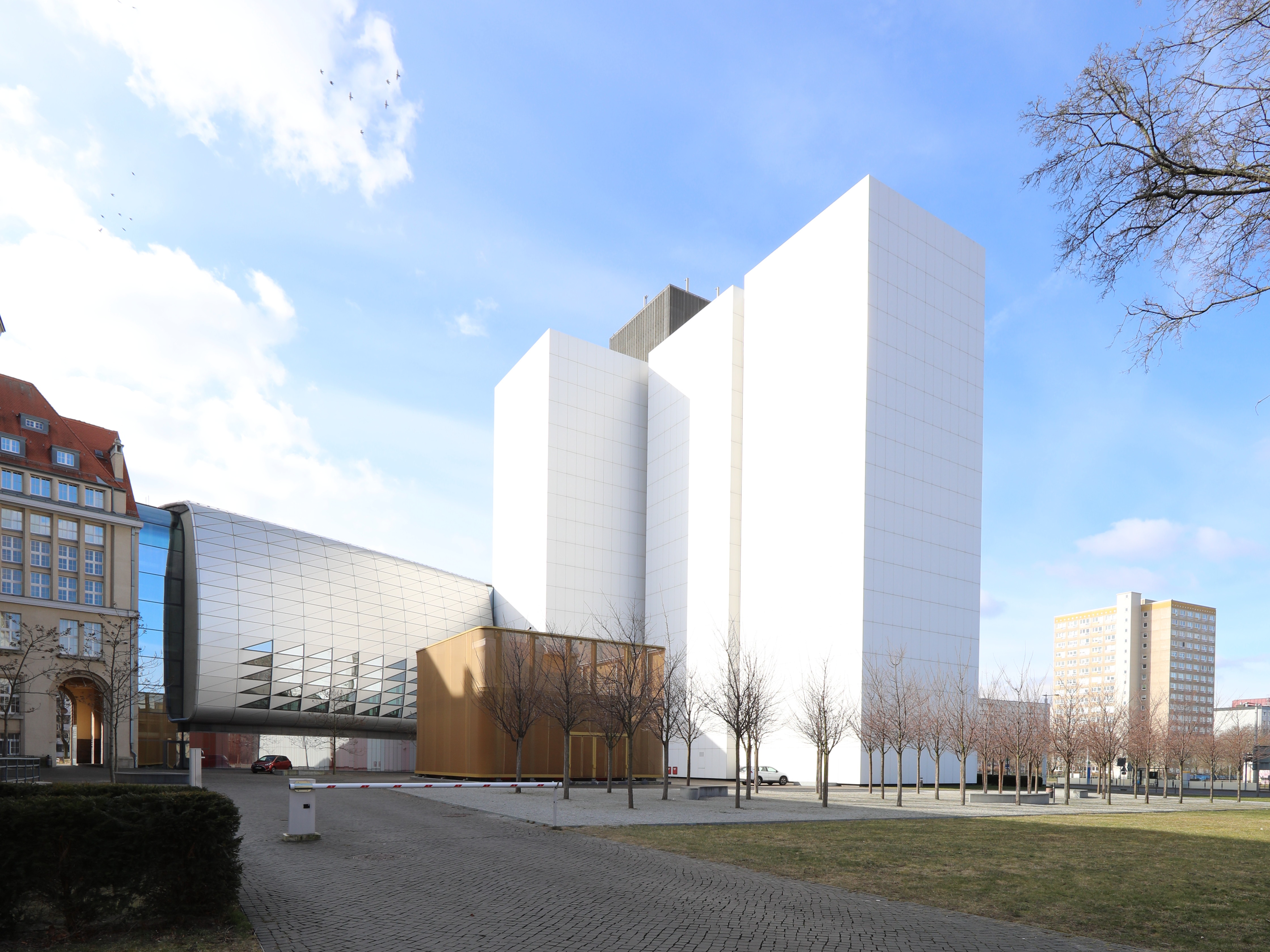 Deutsche Bücherei in Leipzig